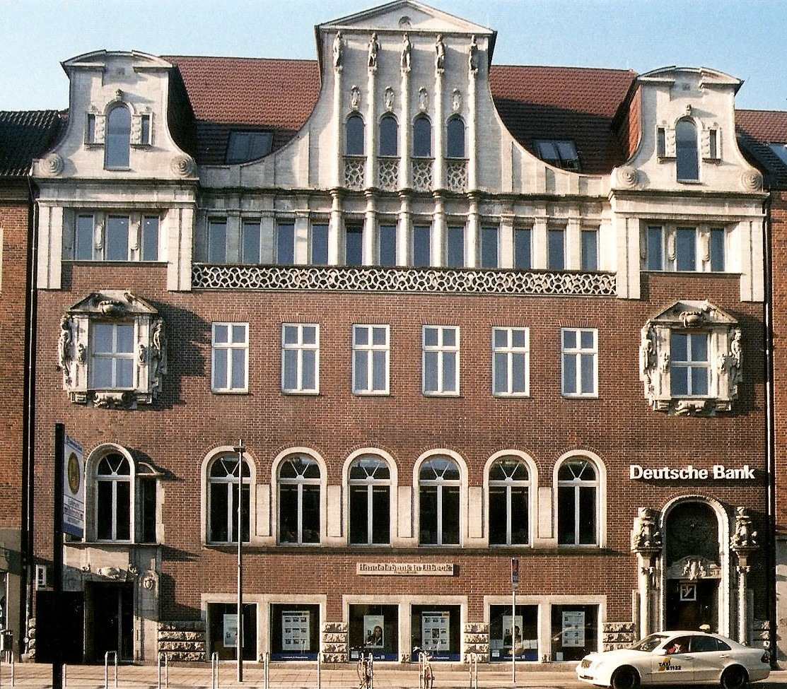 Bankgebäude Kohlmarkt 7-11 in Lübeck; erbaut 1909-1910 für die Commerz-Bank in Lübeck AG nach Entwurf der Berliner Architekten Richard Bielenberg und Josef Moser